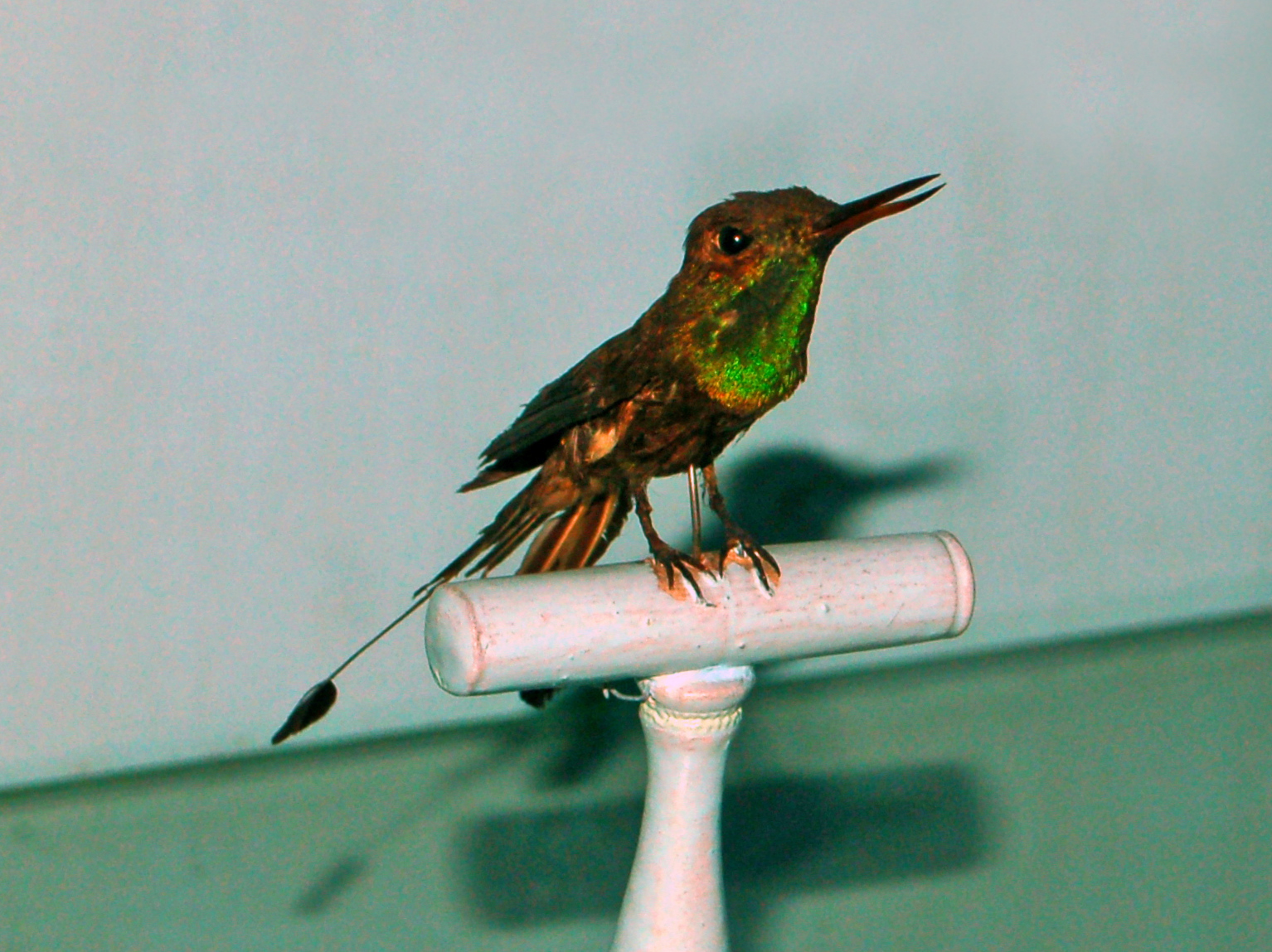 Trochilidae - Discosura longicauda. Mounted specimen